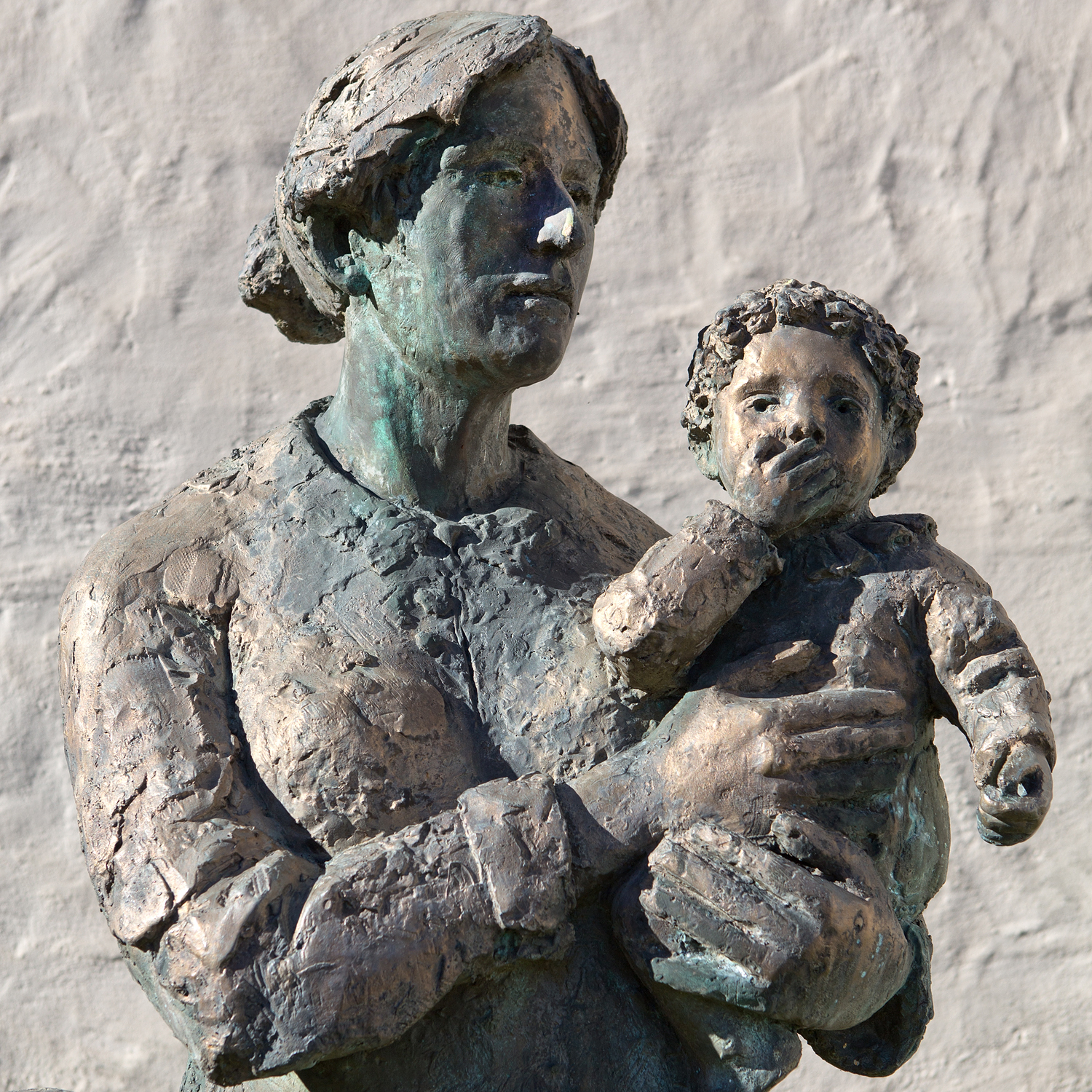 Teilansicht der Skulptur von Rolf Brem (1991), die Dorothee von Flüe-Wyss beim Abschied ihres Mannes Niklaus zeigt